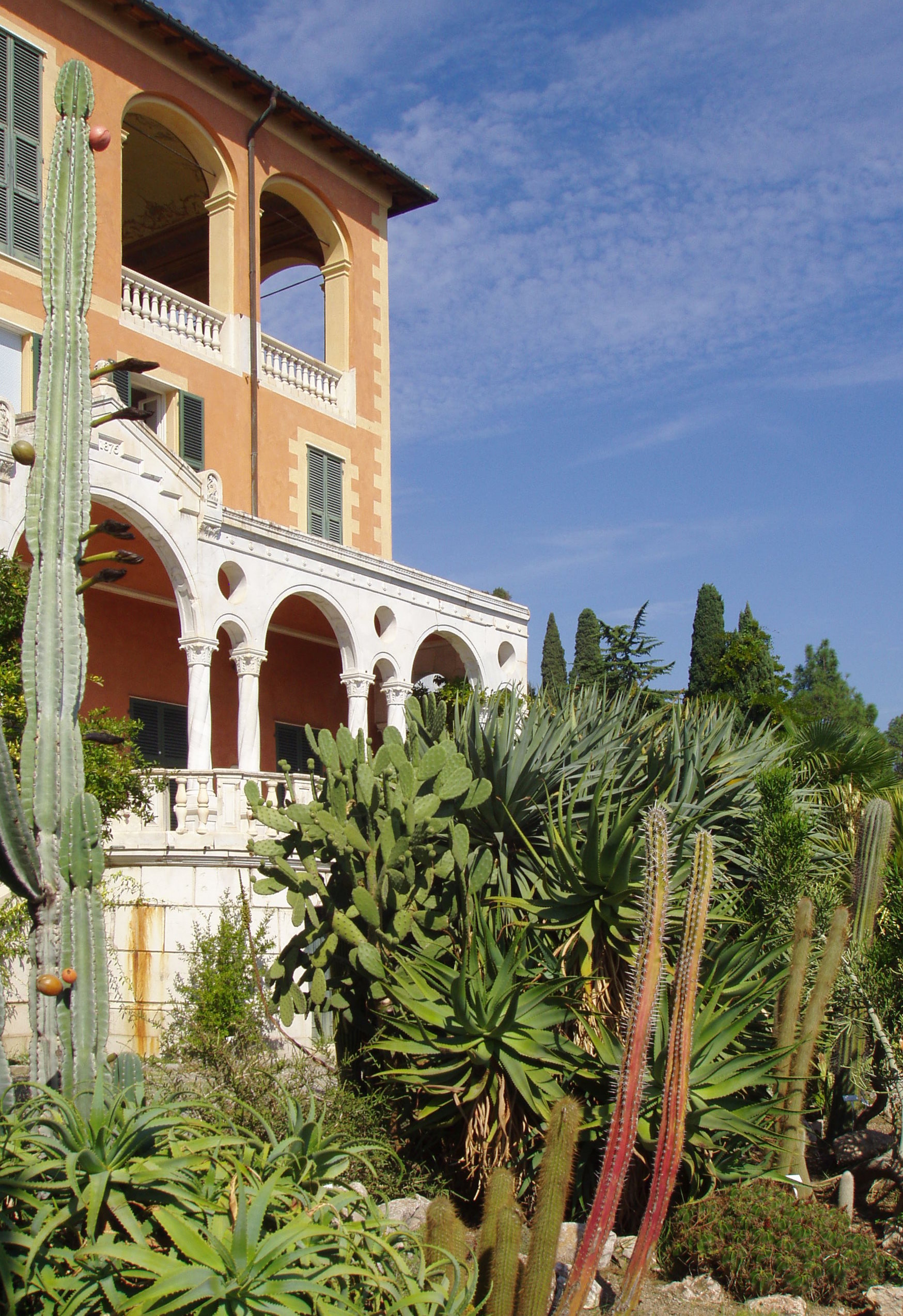 Giardini Botanici Hanbury - villa. Mortola Inferiore, several km west of Ventimiglia, Italy.